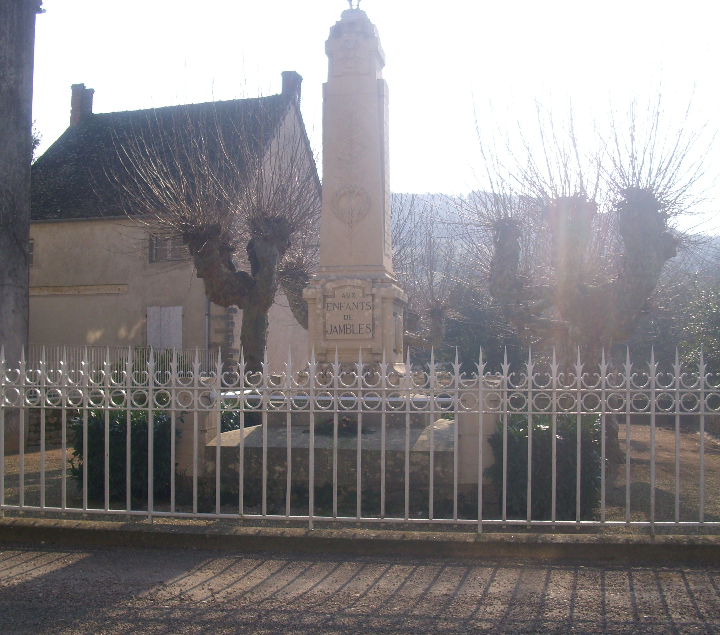 Monuments aux morts de Jambles (71)